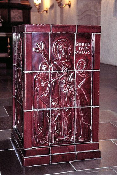 Randers Sankt Mortens Kirke i Danmark. Døbefont af Jais Nielsen